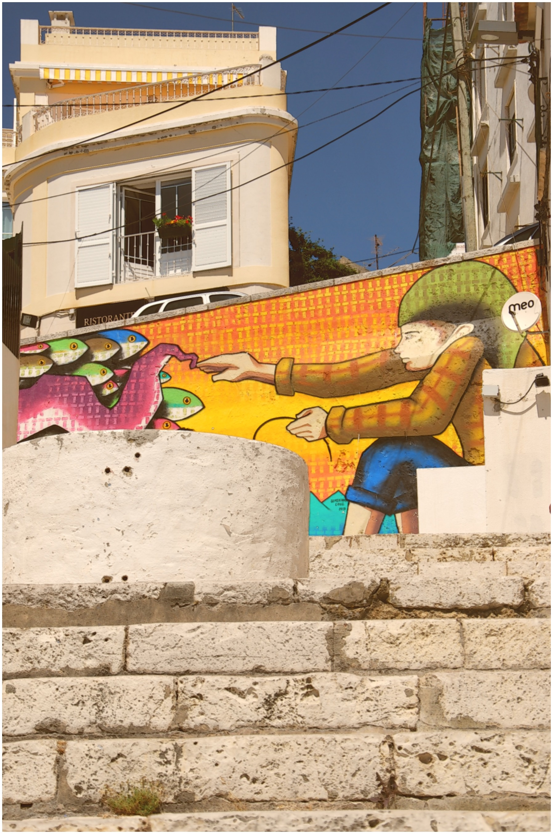 Sesimbra & Portinho 2013